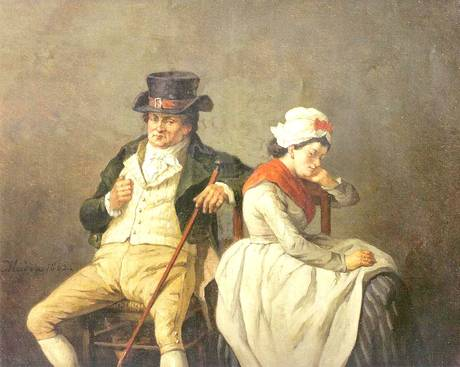 Jean-Baptiste Madou, La bouderie, 1874 (aquarelle sur papier)